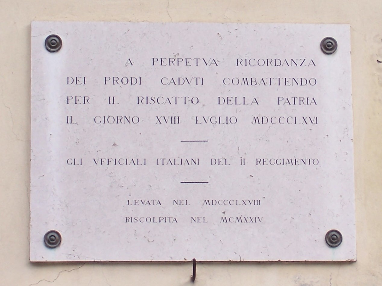 Pieve di Ledro, lapide a memoria dei caduti nella battaglia di Pieve di Ledro.